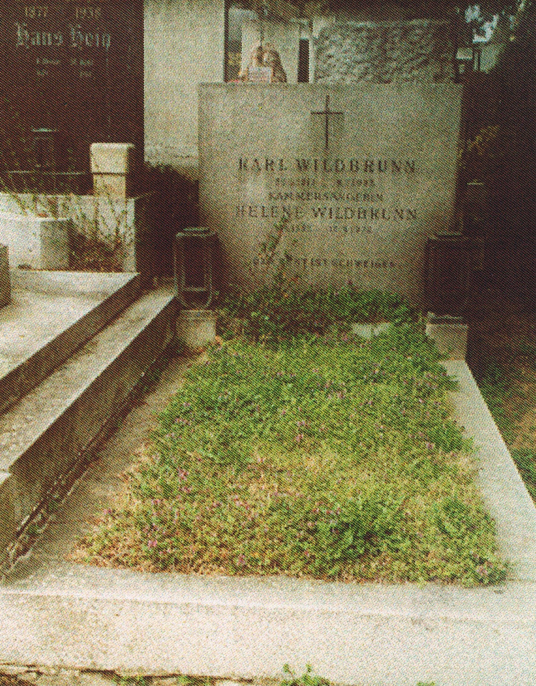 Friedhof Neustift-Helene Wildbrunn